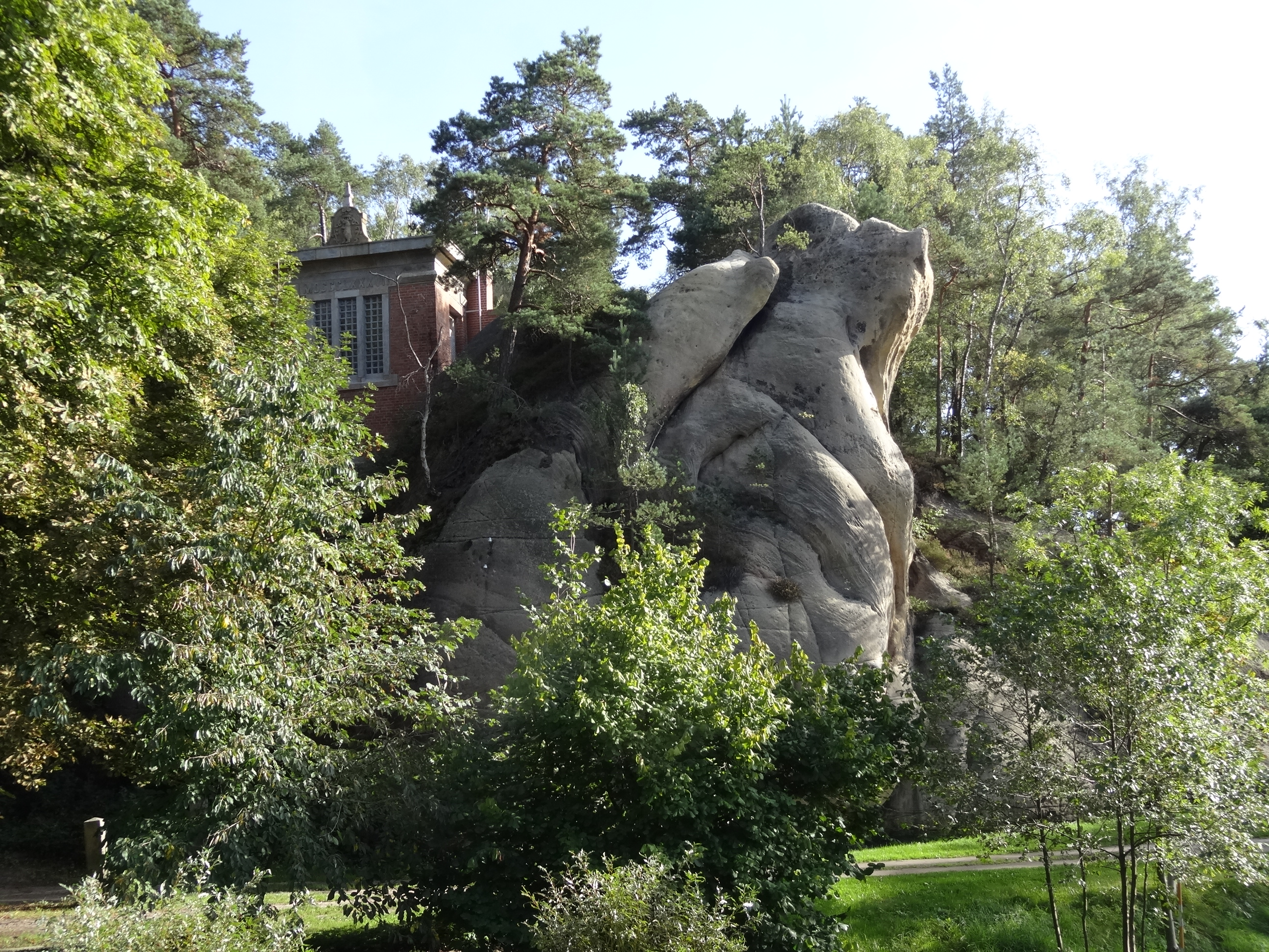 Hodkovice nad Mohelkou - Skalní údolí